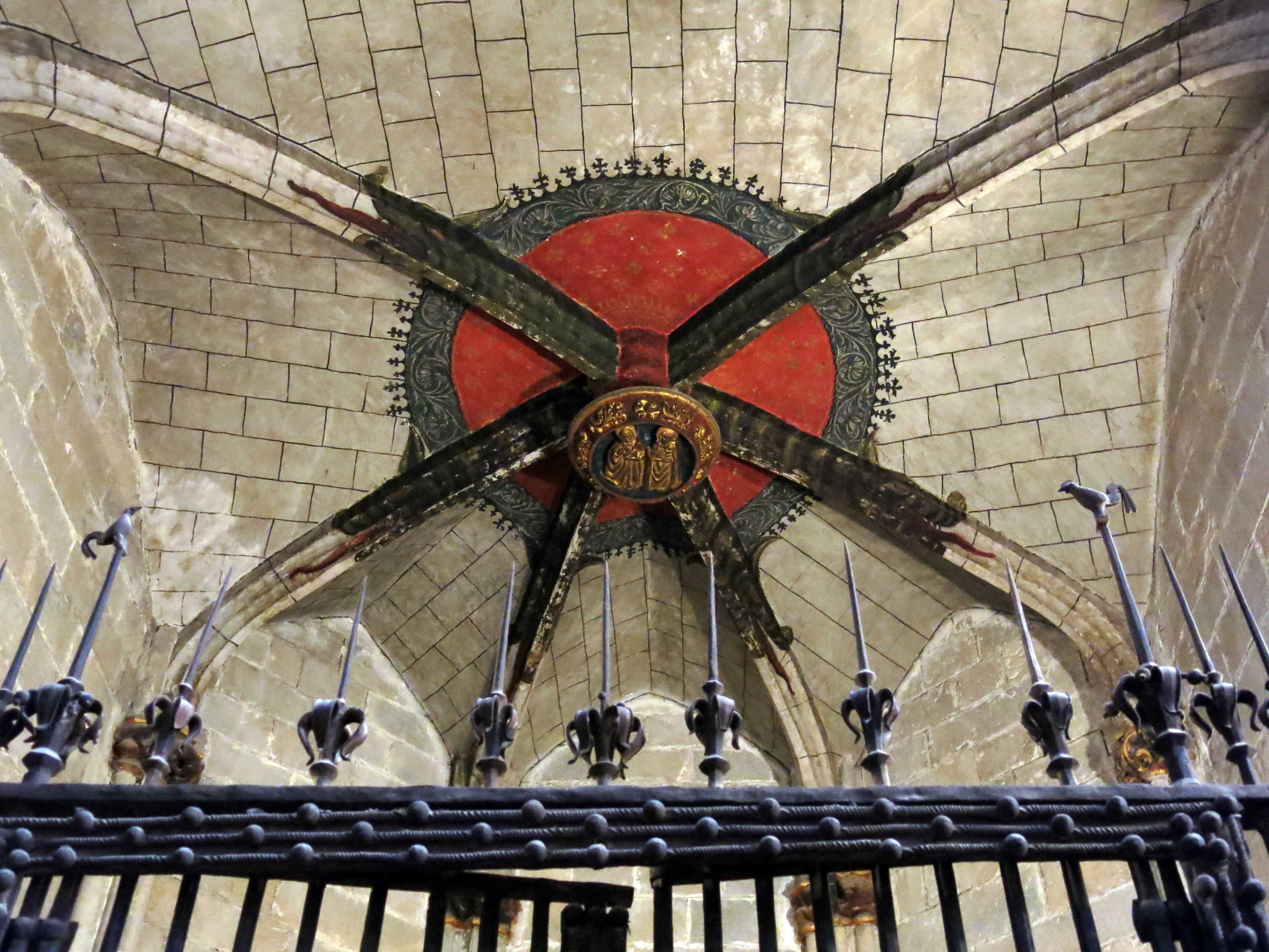 Catedral de Santa Maria (Girona)